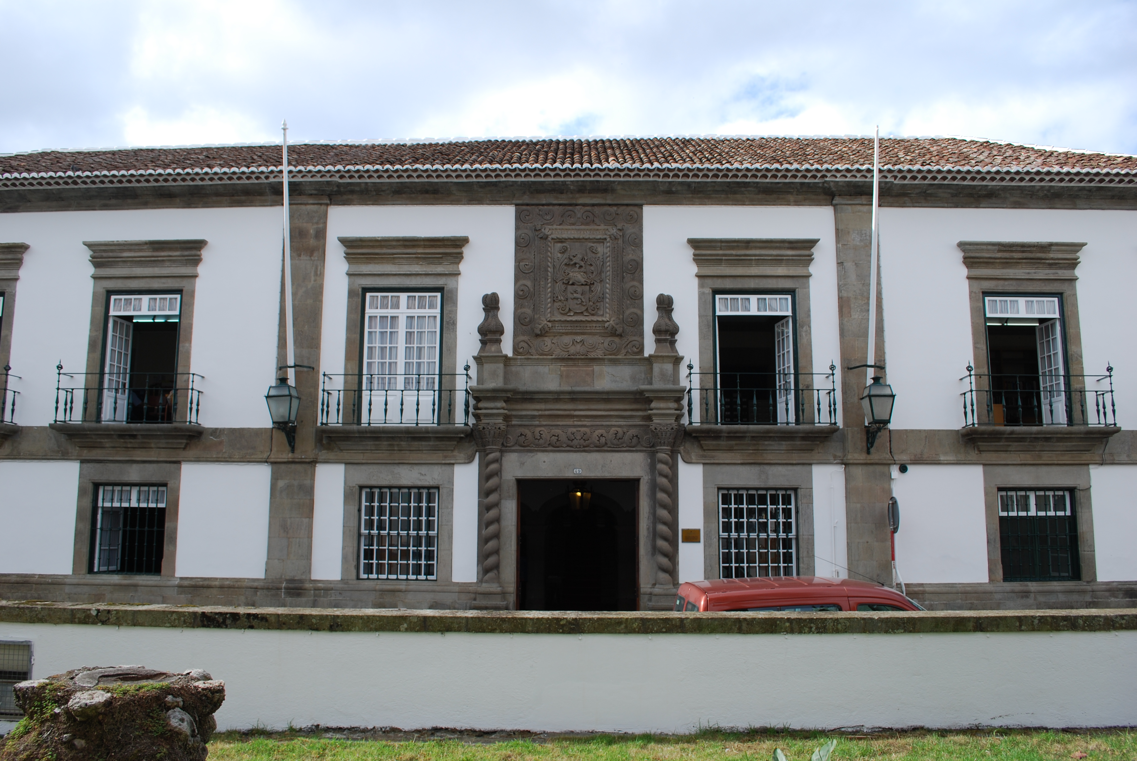 Fachada principal do Palácio Bettencourt, com duas colunas salomónicas e capitéis compósitos e arquitrave.